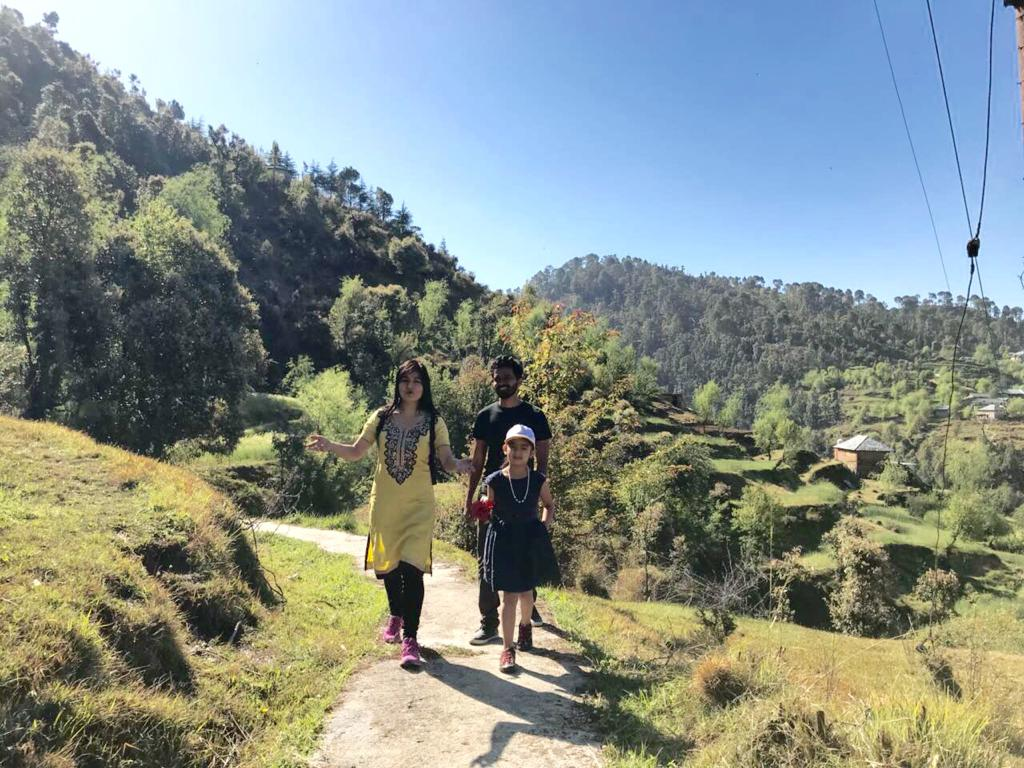 אנשים מתהלכים בכפר סאלי